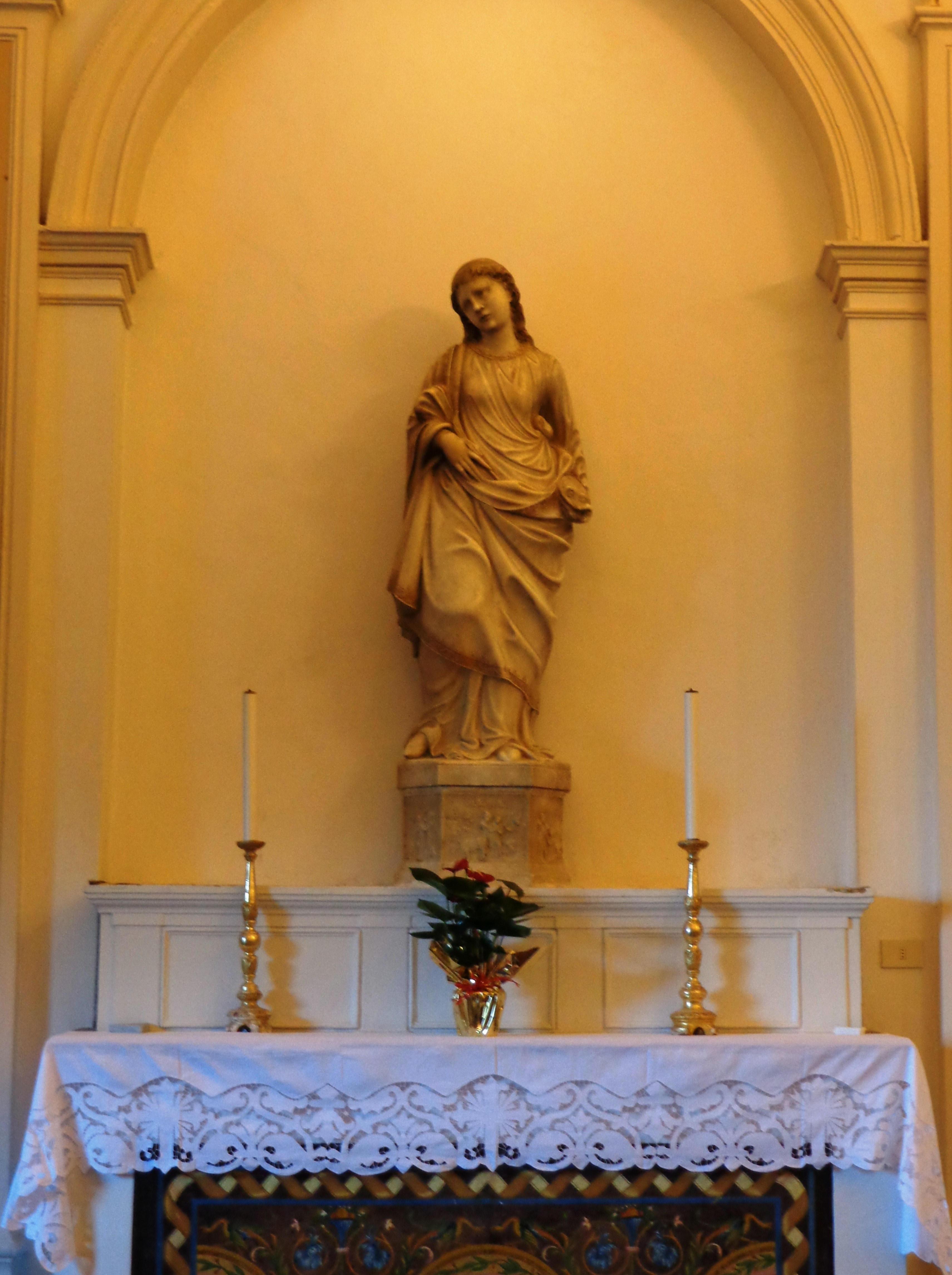 S.Agata_Castroreale_01